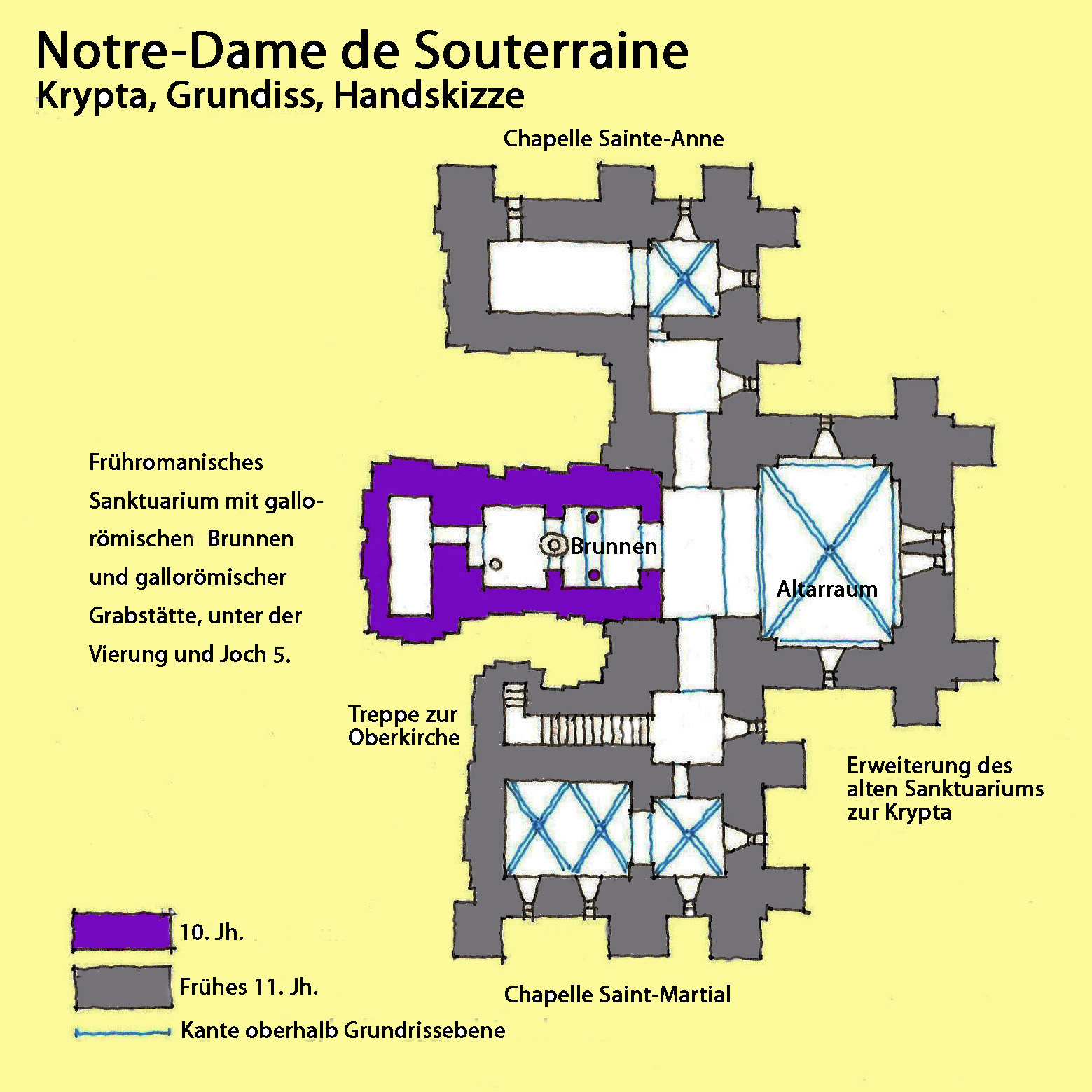 N.-D._de_La_Souterraine.Krypta, Handskizze